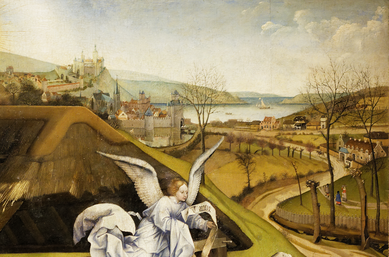 detail: Landscape